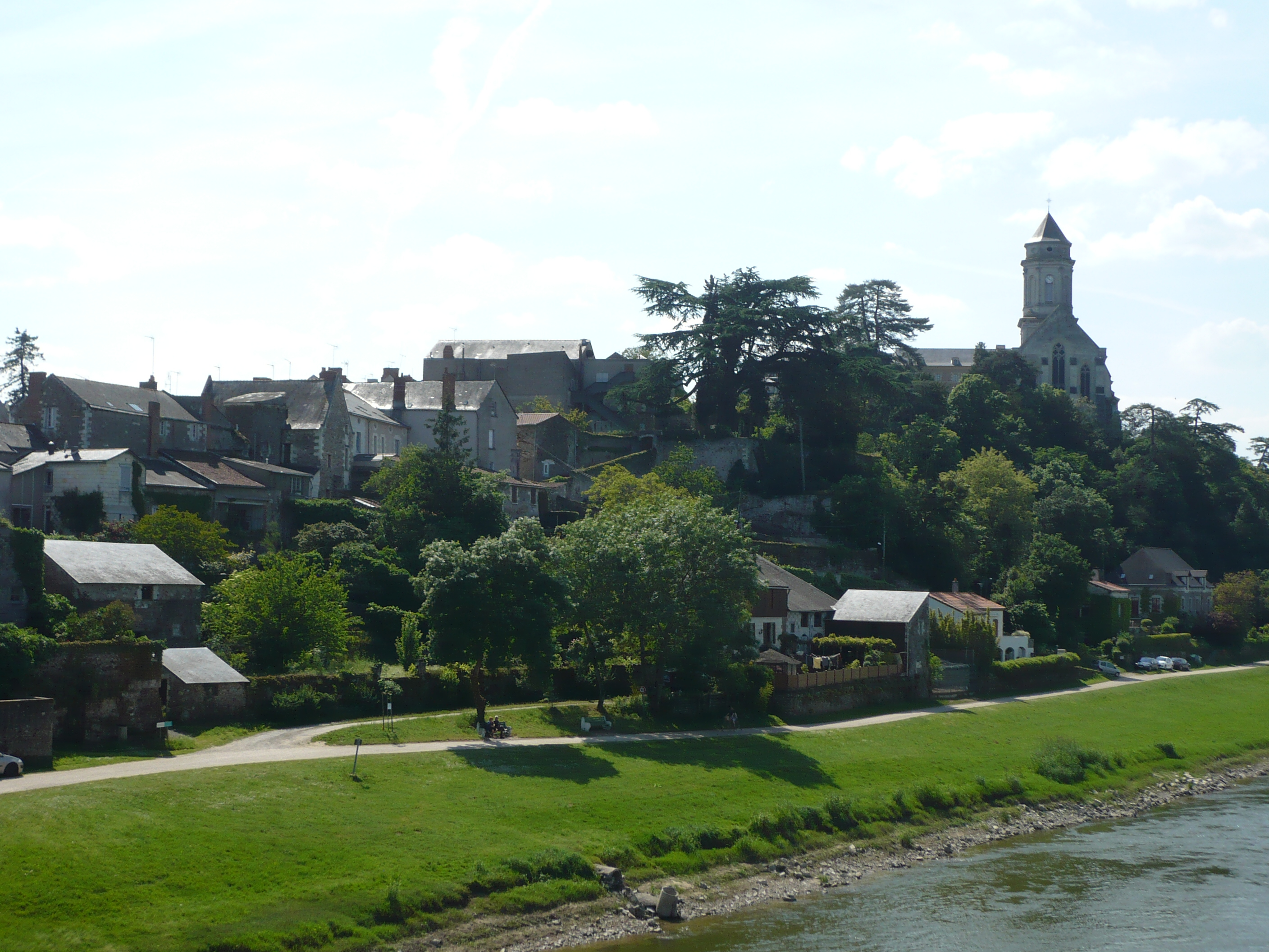 Saint-Florent - Vue du Mont Glonne